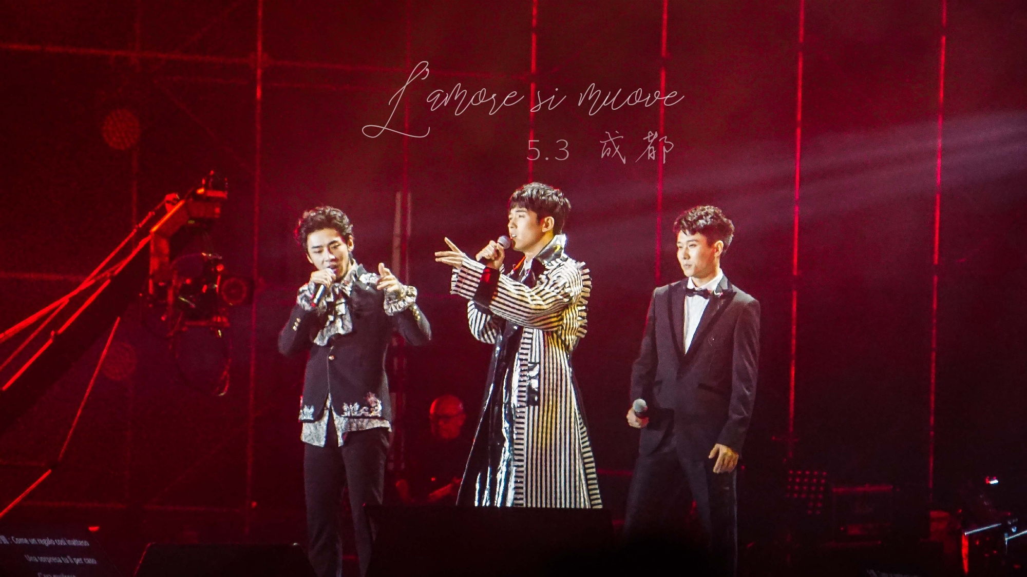 中文（中国大陆）: 《声入人心》成员参加成都音乐盛典保利art音乐节